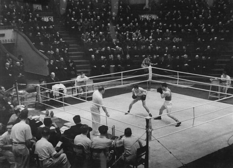 Moskau, Internationales Boxturnier, Boxring Zentralbild XIII 6.5.1952 Internationales Länderturnier der Amateurboxer in Moskau vom 7.-15.März 1952. Im Moskauer Staatlichen Zirkus fanden die internationalen Freundschaftswettkämpfe von Amateurboxern aus 7 Ländern statt. Im Ring trafen sich die Mannschaften der UdSSR, der CSR, Ungarn, Bulgarien, Polens, Rumäniens und der Deutschen Demokratischen Republik. UBz: Einen Blick in den Moskauer Staatlichen Zirkus an einem der Wettkampftage.